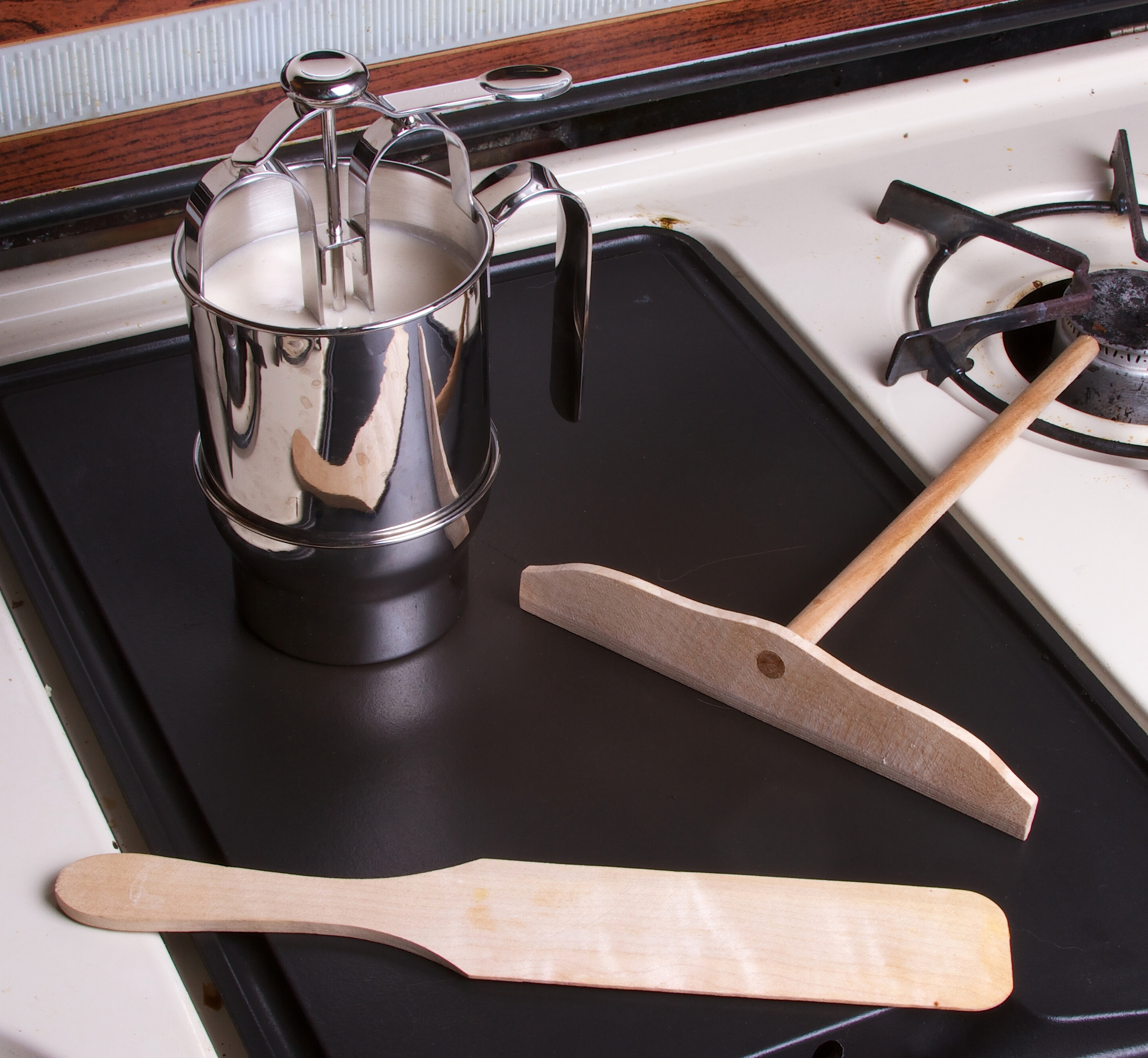 Utensilien für die Zubereitung von Crêpes oder auch Galettes: Teigspender (hier mit dünnflüssigem Crêpes-Teig gefüllt), Teigrechen und Palette.